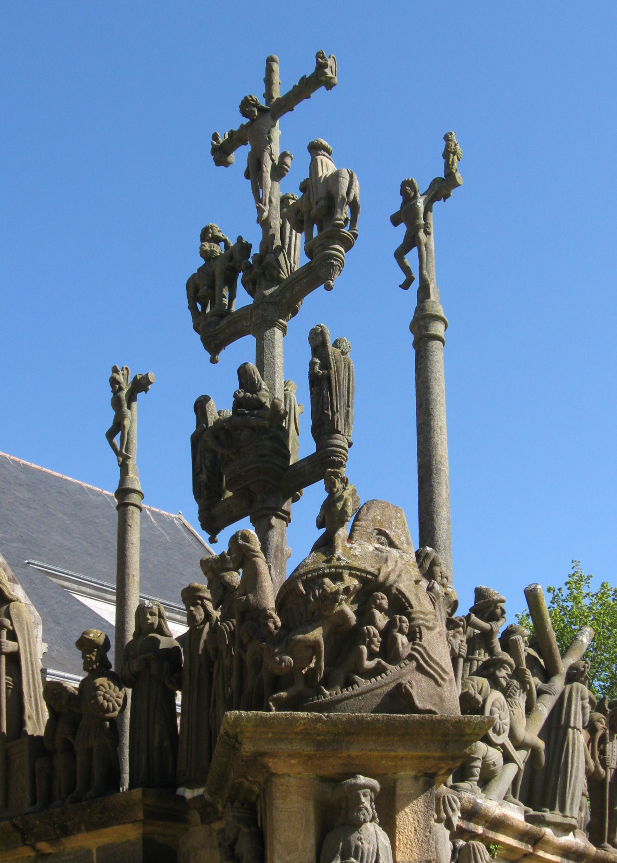 Plougastel-Daoulas, Finistere, Bretagne